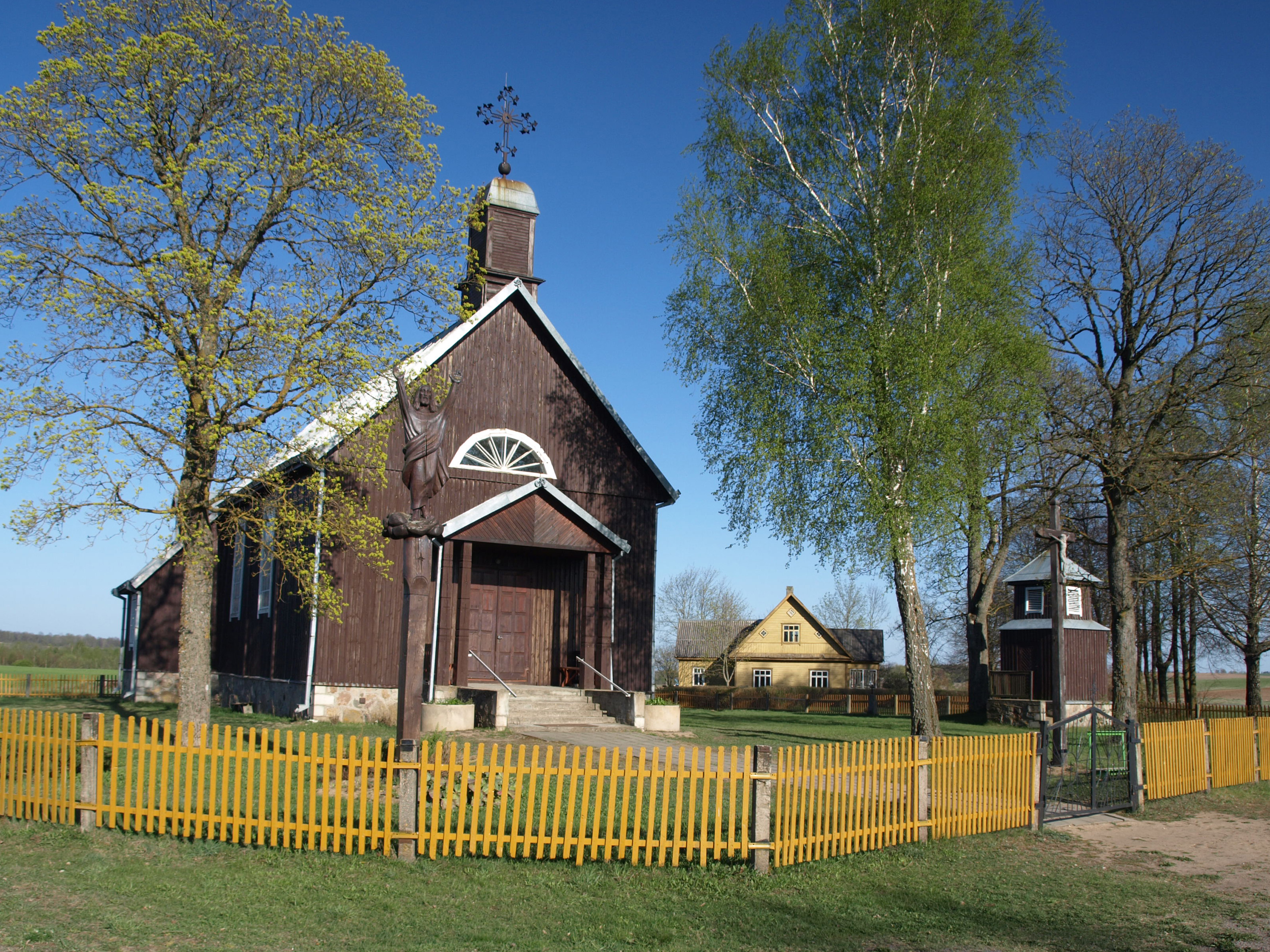 Kacergiske church